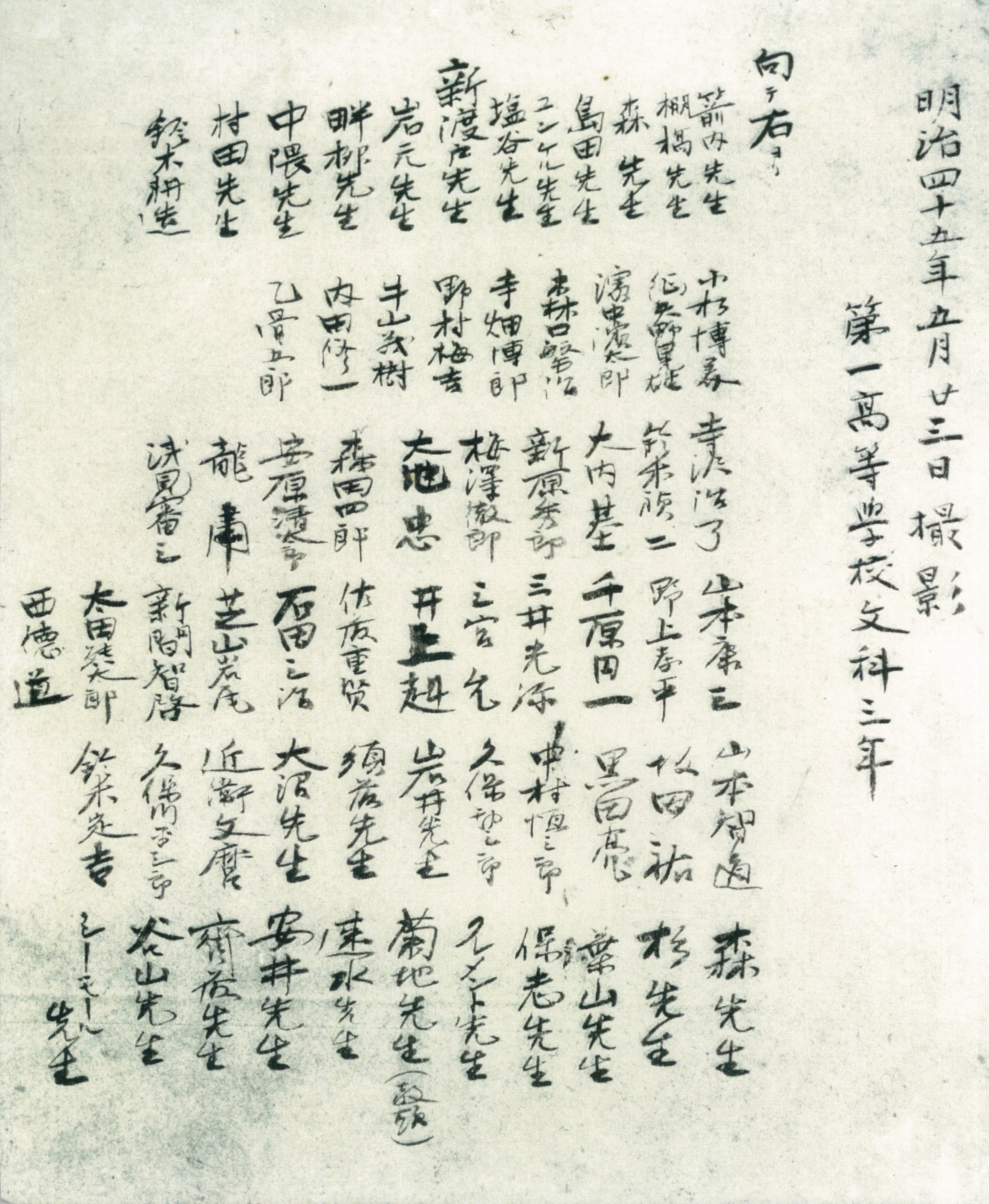 第一高等学校文科年集合写真の名列（坂田記念館提供）